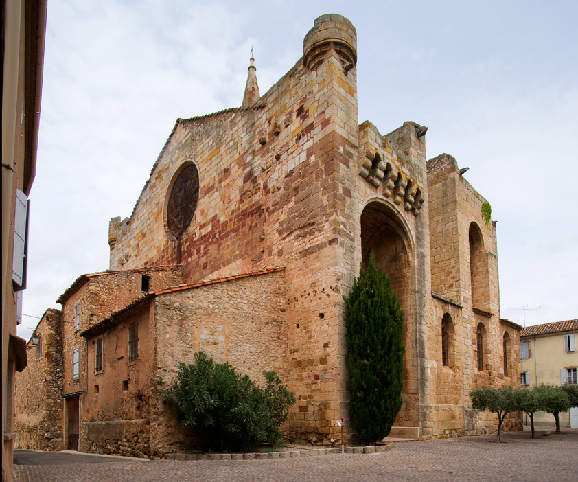 Eglise de Cruzy .